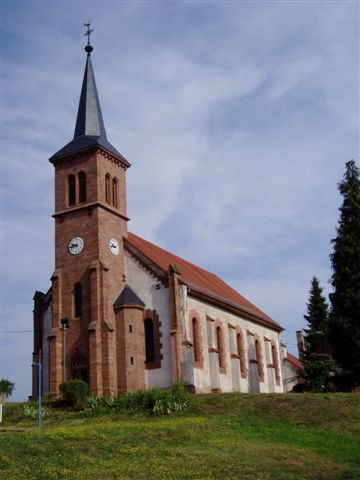 église de Rolbing